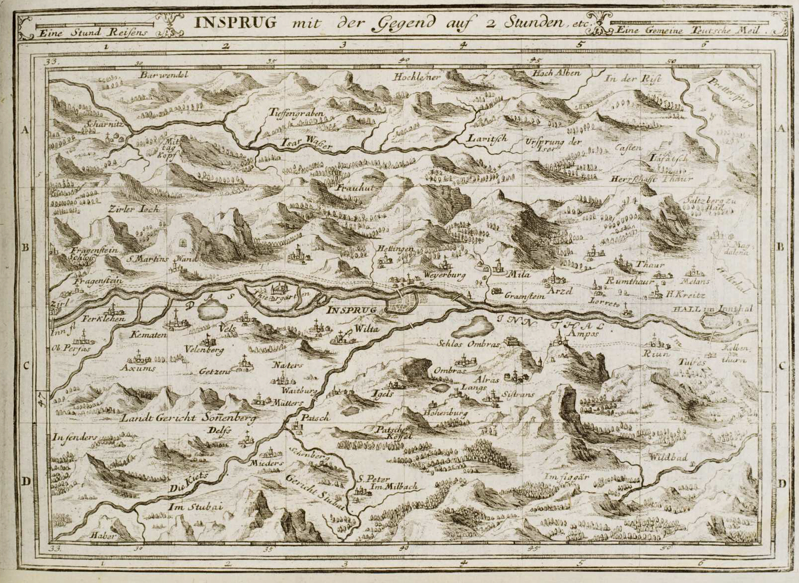 Curioses Staats und Kriegs Theatrum Dermahliger Begebenheiten im Tyrol : durch Unterschiedliche Geographische, Hydrographische, Topographische, Chronologische, Genealogische, Historische &c. Carten, Abrisse, und Tabellen Erlaeutert, Augspurg : Stridbeck, [ca. 1700] Insprug mit der Gegend auf 2 Stunden